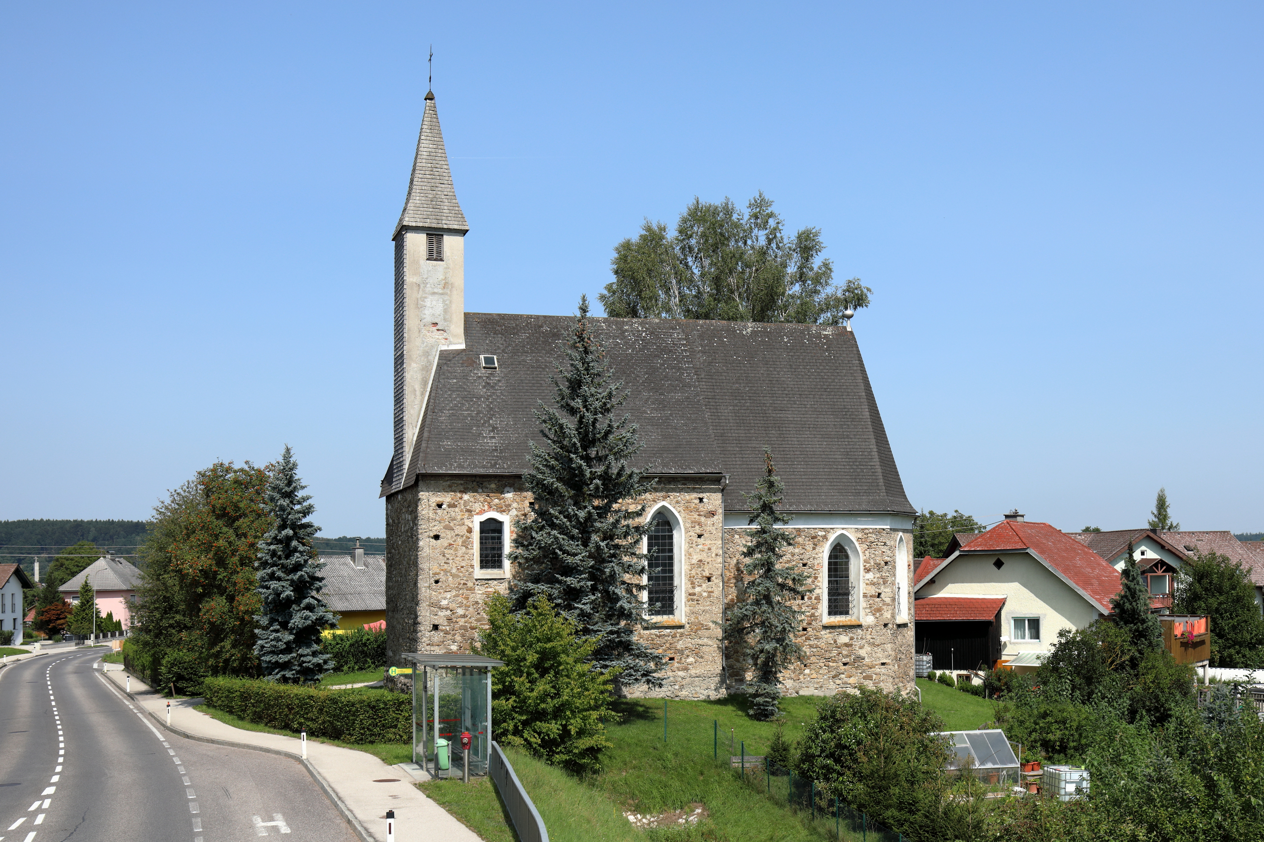 Südansicht der sogenannten Schimmelkirche (röm.-kath. Filialkirche hl. Andreas) in Pichlwang, ein Dorf, das vorwiegend sich auf dem Gebiet der oberösterreichischen Marktgemeinde Timelkam befindet, jedoch der südliche Teil gehört zur Marktgemeinde Lenzing. Die spätgotische Kirche wurde am 19. Jänner 1508 von Weihbischof Bernhard Meurl von Passau geweiht.